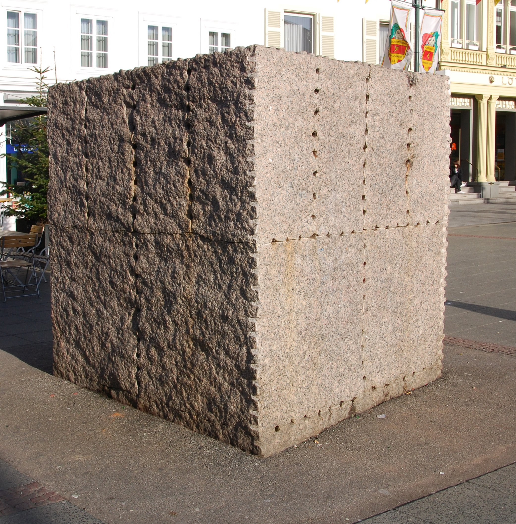 Skulptur Granit Rosa Porriño von Ulrich Rückriem in Lörrach